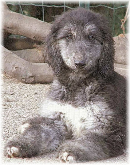 Lévrier afghan, chiot femelle, Coco Chanel d'Hezaradjah, él. Michèle Granger